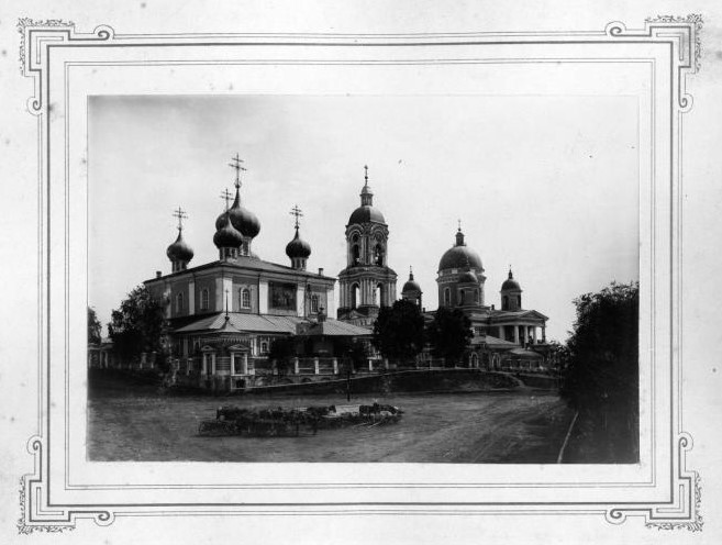 Новгородская губ., г.Боровичи. Собор Введения Пресвятой Богородицы. ~1890-1910гг.